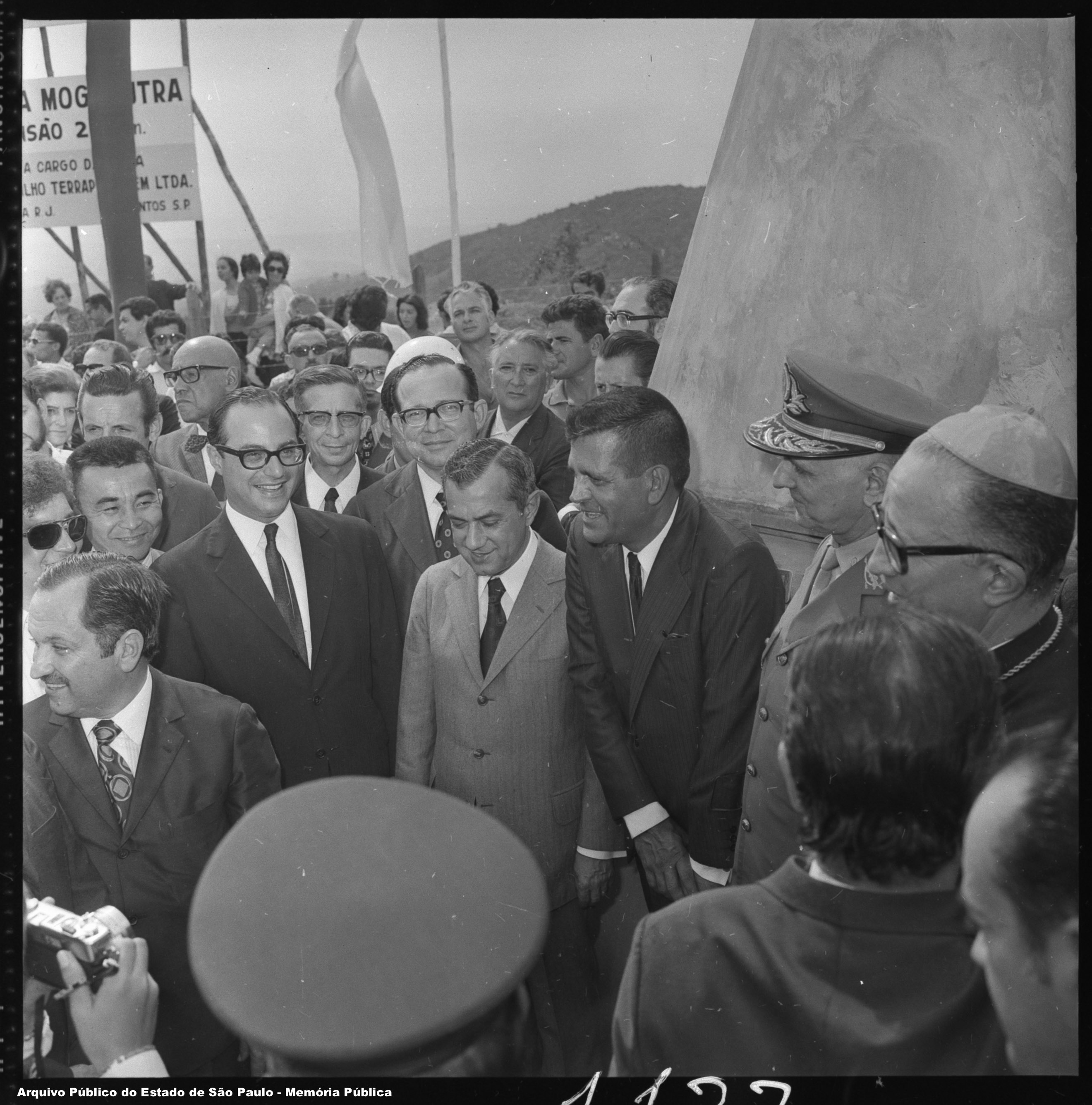 O governador Laudo Natel ladeado por Paulo Maluf (à esquerda), secretário estadual de transportes e Waldemar Costa Filho (à direita), prefeito de Mogi das Cruzes, durante a inauguração da Rodovia Mogi Dutra. Foto do Acervo Iconográfico do Arquivo Público do Estado de São Paulo, código BR APESP SEGOV ICO NEG 4099 03.